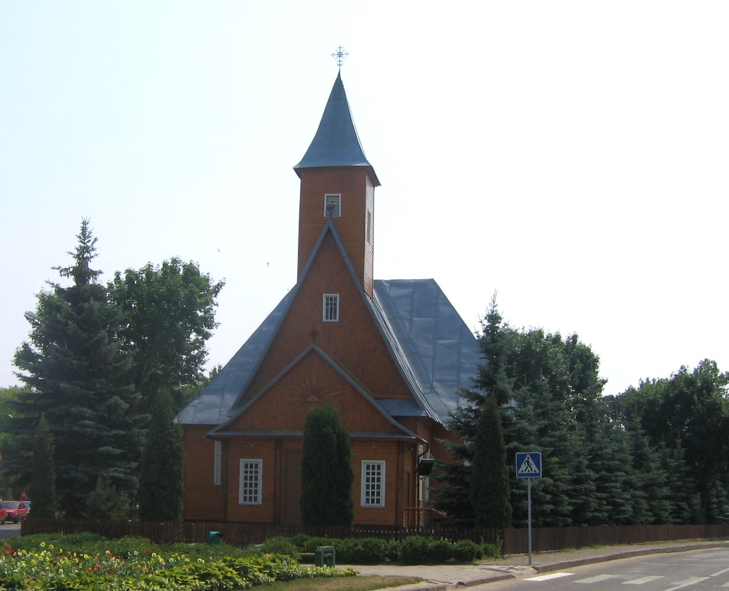 Autoriaus nuotrauka. 2006.07.11. Varėnos bažnyčia